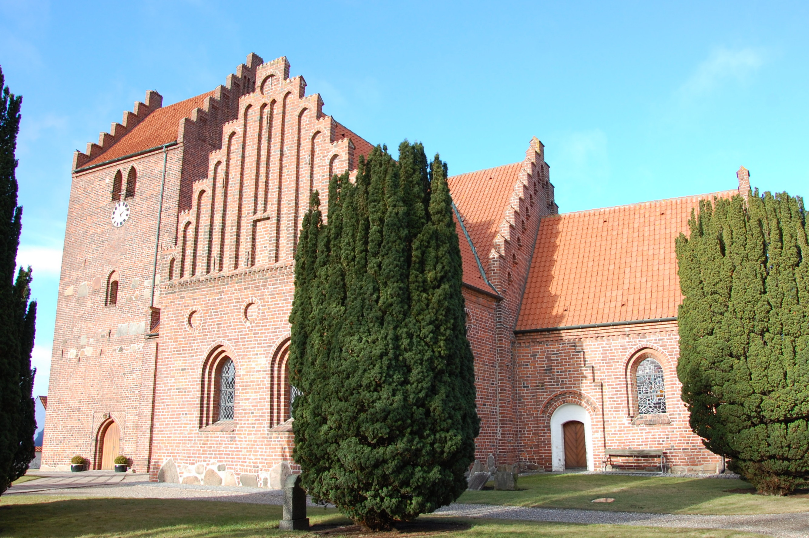 Kirche von Nyköbing Südseite